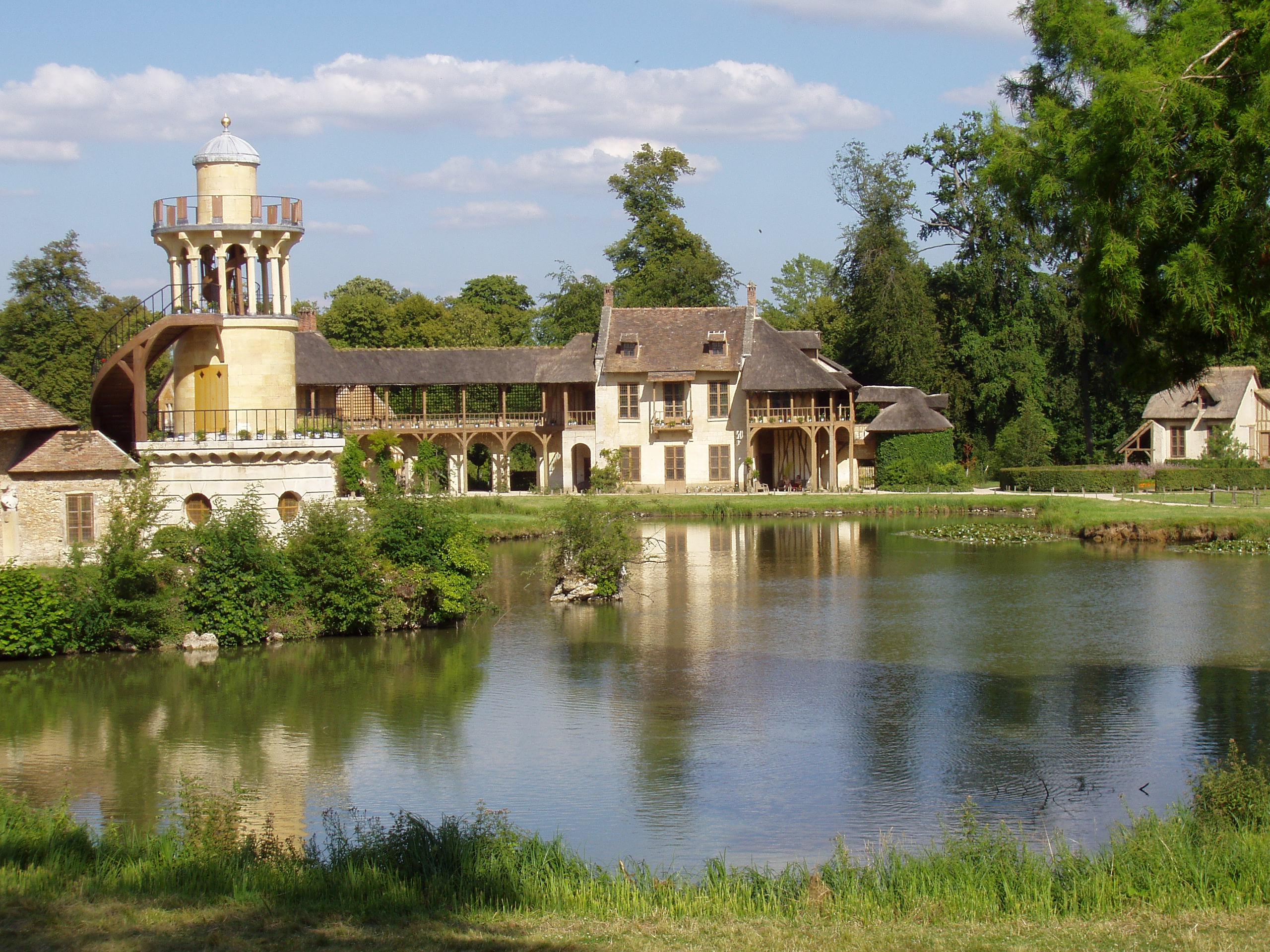 Marie Antoinette's village amusement at the Château de Versailles, by Richard Mique